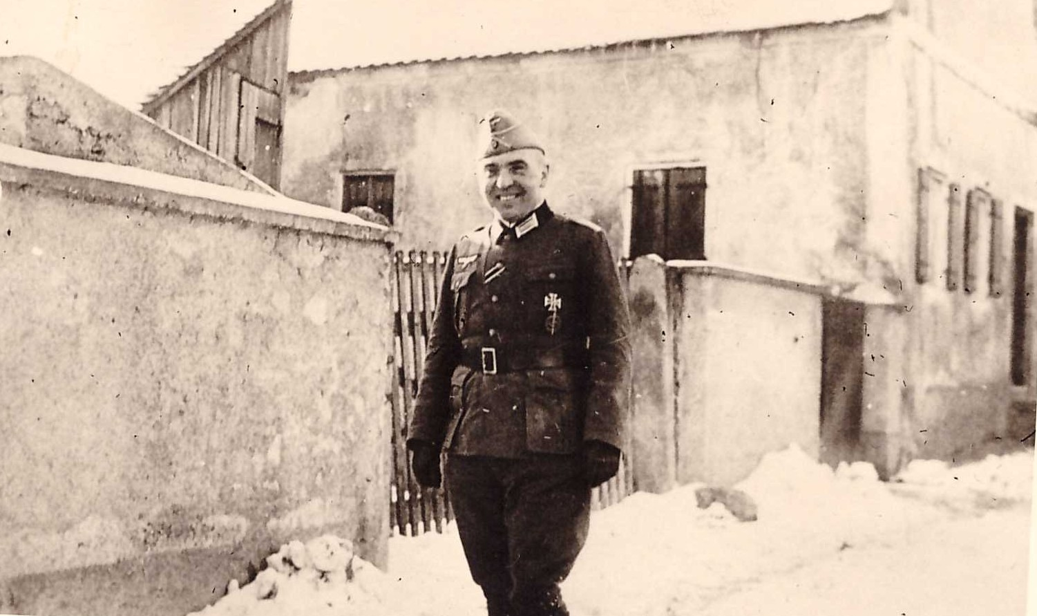 Karl Raapitz, Bürgermeister in Bentheim (1938-1944) (Bild: Oberleutnant Winter 1943/44)